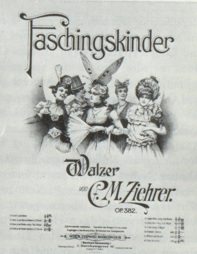 Carl Michael Ziehrer Faschingskinder